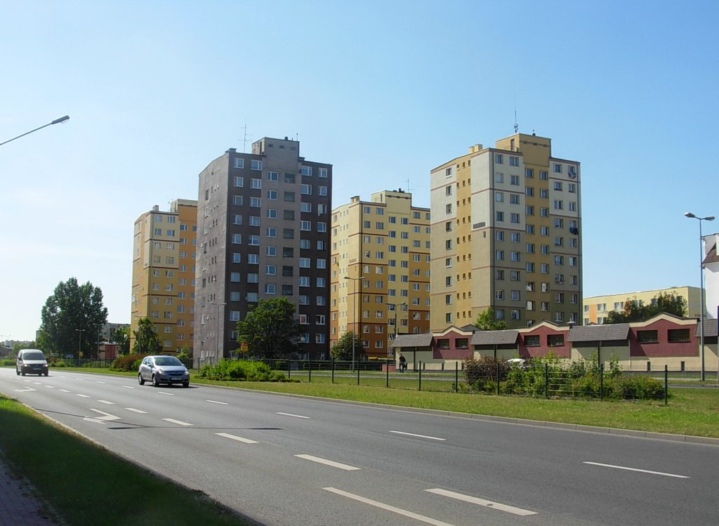 Osiedle Szwederowo w Bydgoszczy